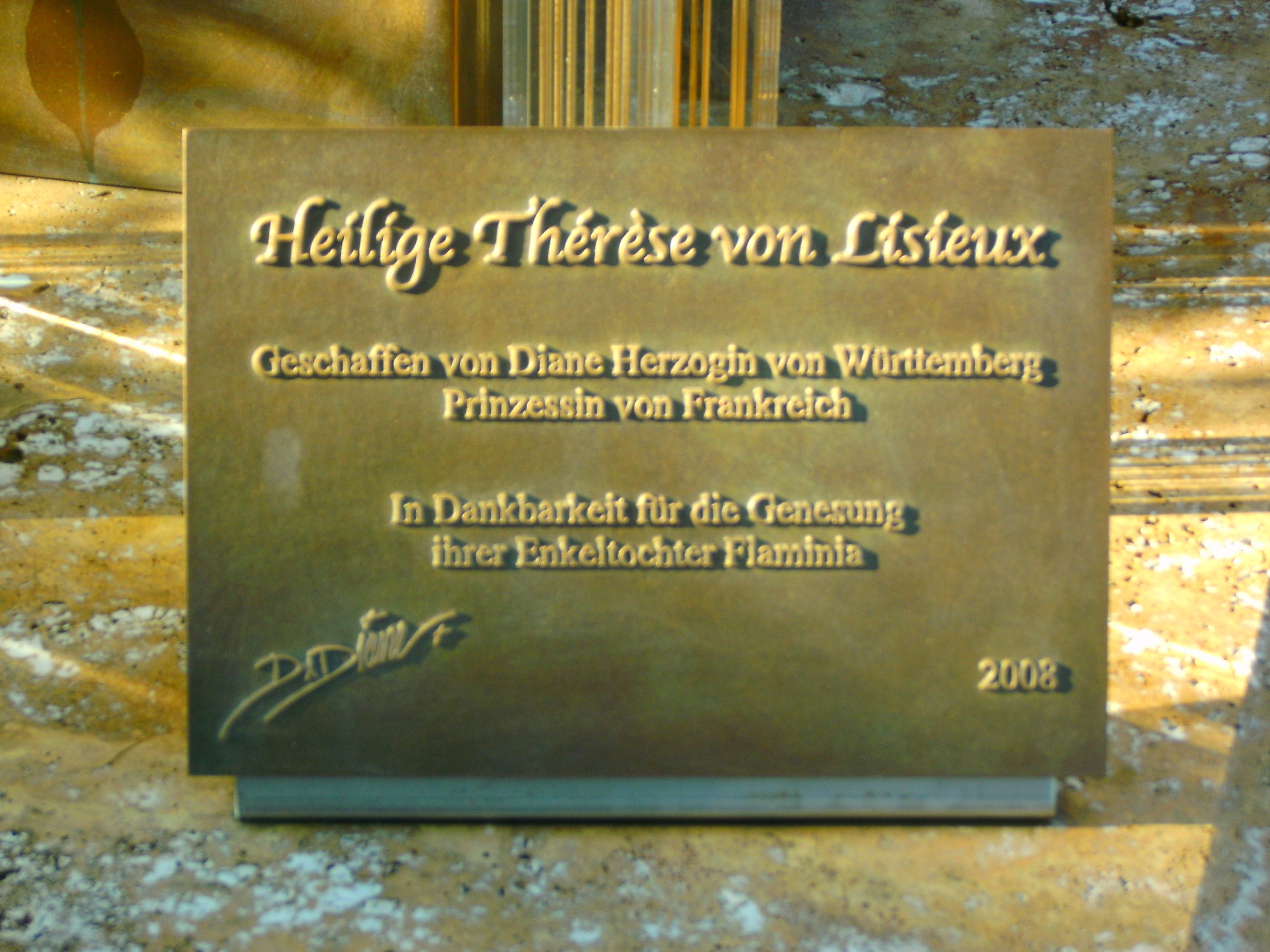 Kunstwerke Diane Herzogin von Württemberg